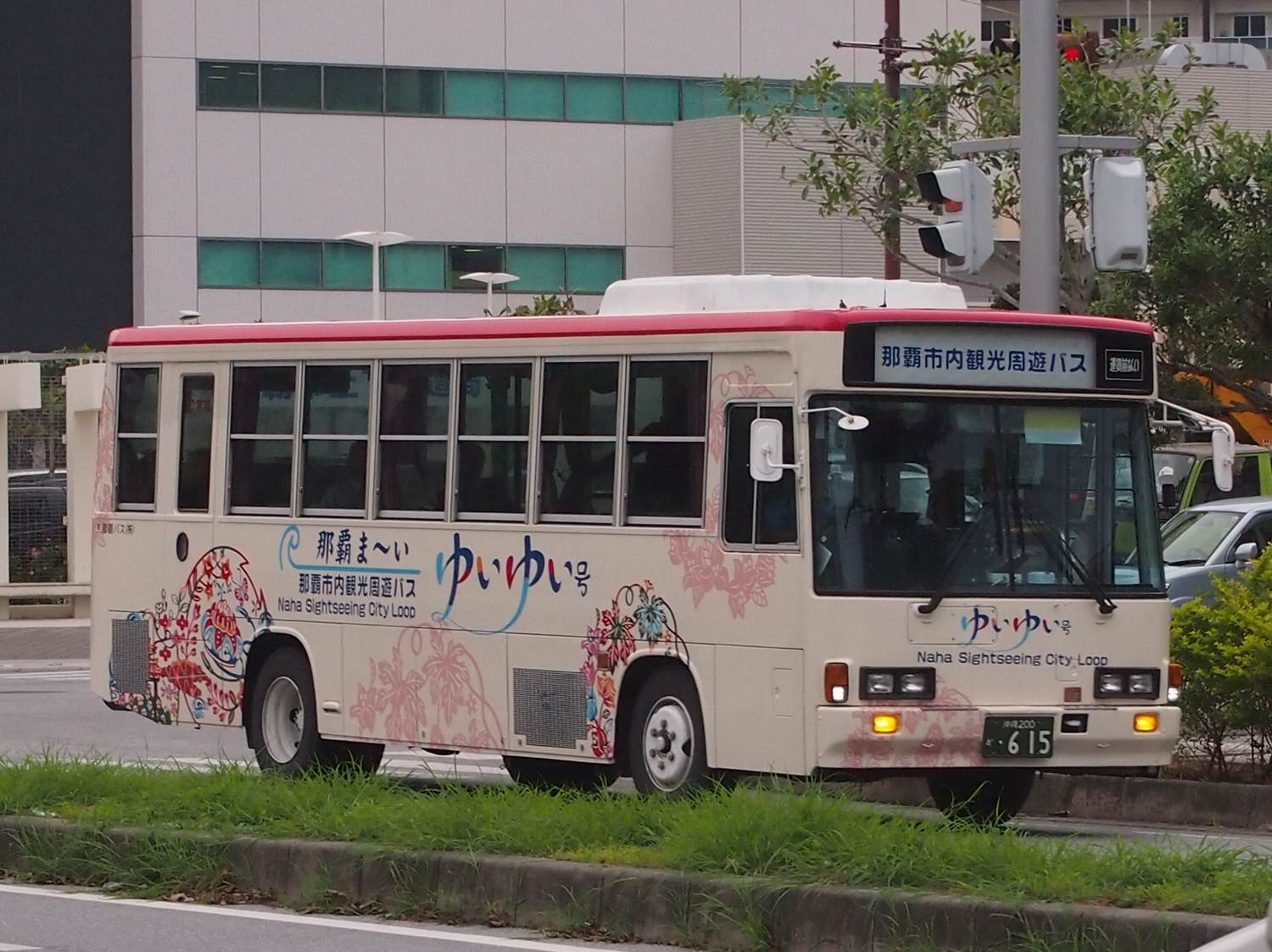 那覇市内観光周遊バス615号車（おもろまち一丁目バス停付近）